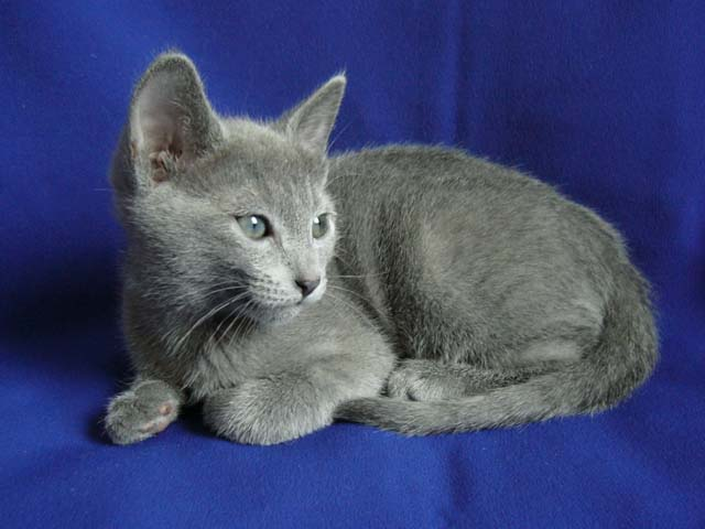 Russian Blue kitten